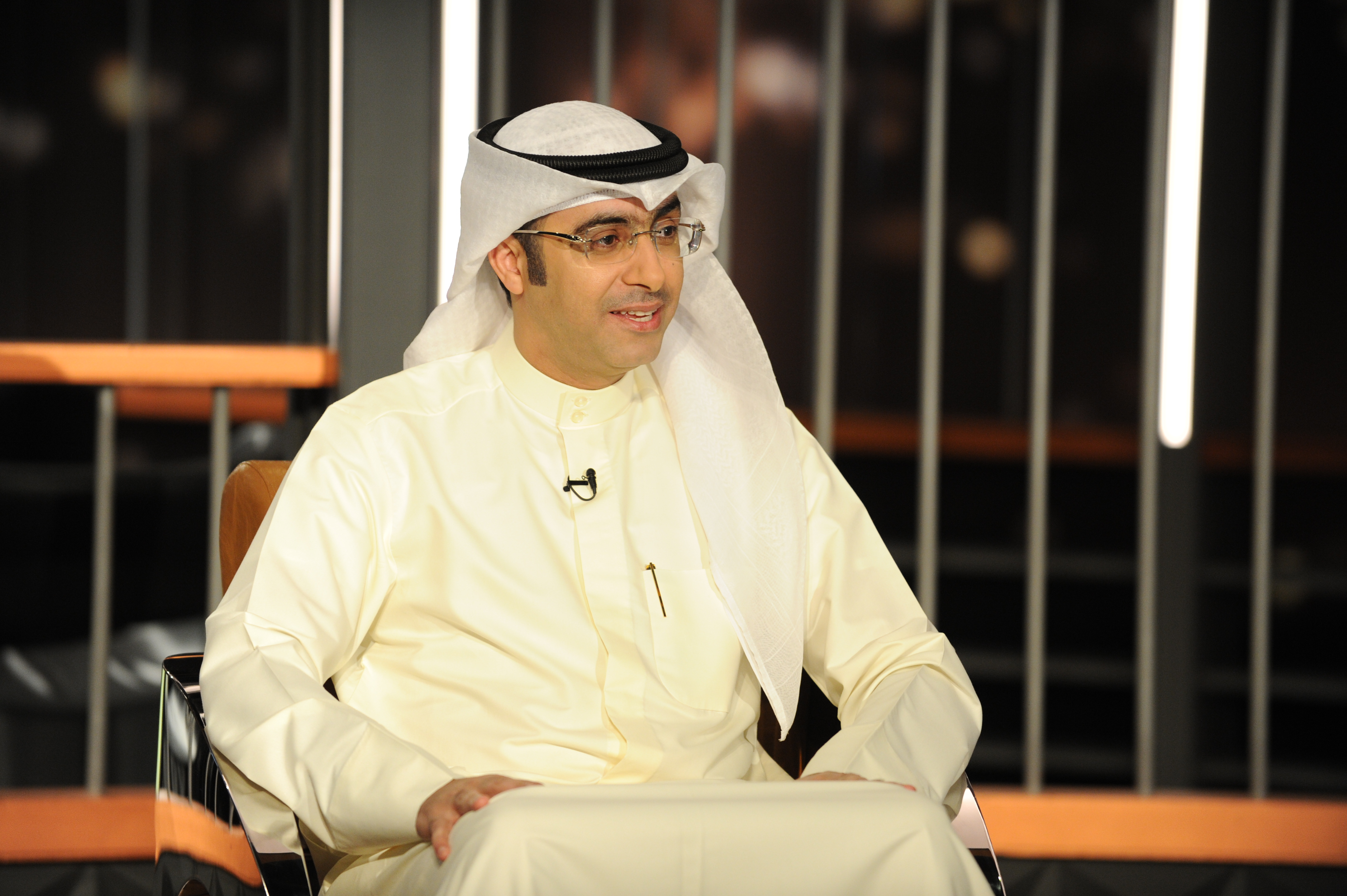 الاعلامي احمد الفضلي يعلن عن خارطة برامج قناة atv في رمضان